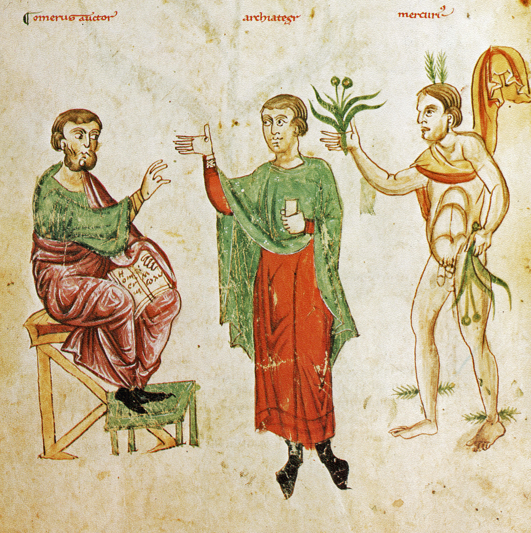 Diese allegorische Szene zeigt Homer, einen Arzt und den Gott Mercurius, der das von Homer beschriebene Kraut Moly hält. Die Flügel an Kopf und Fußknöcheln des Mercurius wurden in mittelalterlicher Umdeutung zu grätenartigen Auswüchsen und der eigenartig hochgehobene Mantel könnte auf Wagenlenker in voller Fahrt zurückgehen. Weiter bemerkenswert sind die hier ausnahmsweise nicht getilgten Genitalien. Diese Miniatur ist eine Kopie einer Vorlage aus dem 6. Jahrhundert (Medicina antiqua, Cod. Vind. 93. Ausschnitt aus Blatt 61 verso)